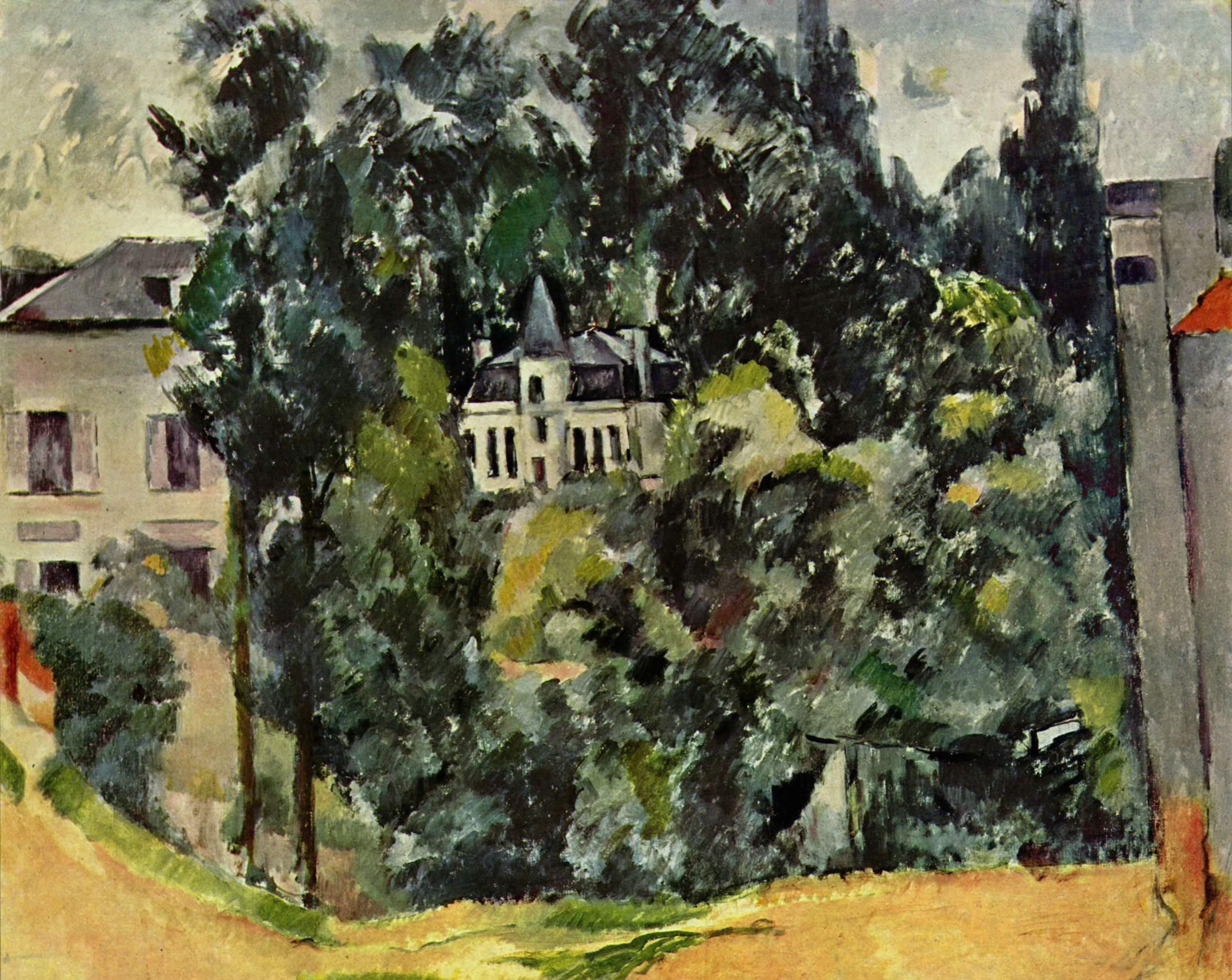 Schloß von Marines